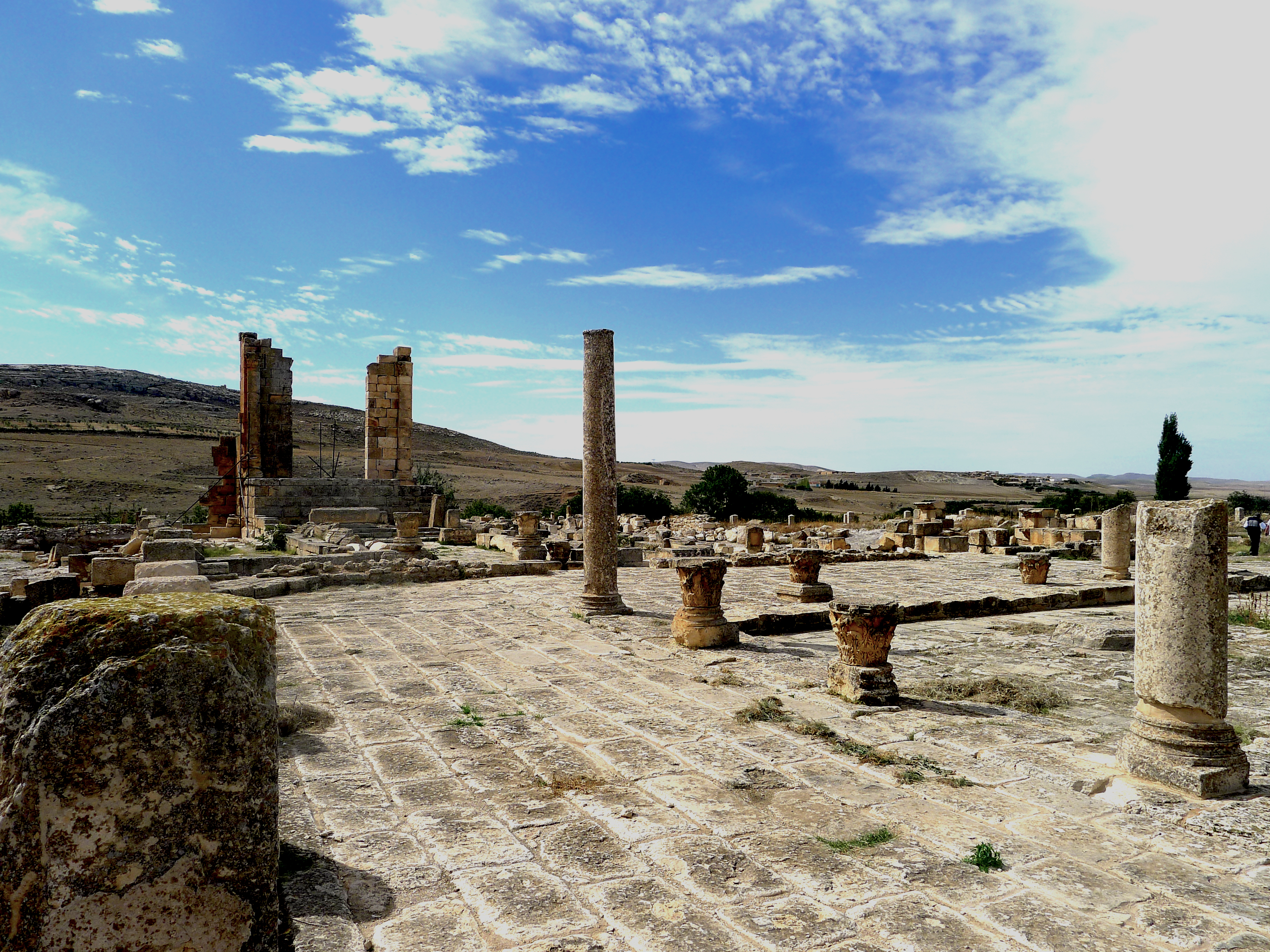 Place publique : le forum d'Althiburos est une place dallée rectangulaire, orientée du Nord au Sud sur la diagonale, ayant 23 m du Nord-Ouest au Sud-Est et 30 m du Nord-Est au Sud-Ouest. Sur ses quatre faces, il est entouré par un péristyle surélevé d’une marche large. Les dalles, bien taillées et soigneusement assemblées, sont conservées pour la plupart. Quelques unes, sous la galerie sud-est, portent des inscriptions sommairement gravées, dont le sens nous échappe parfois.